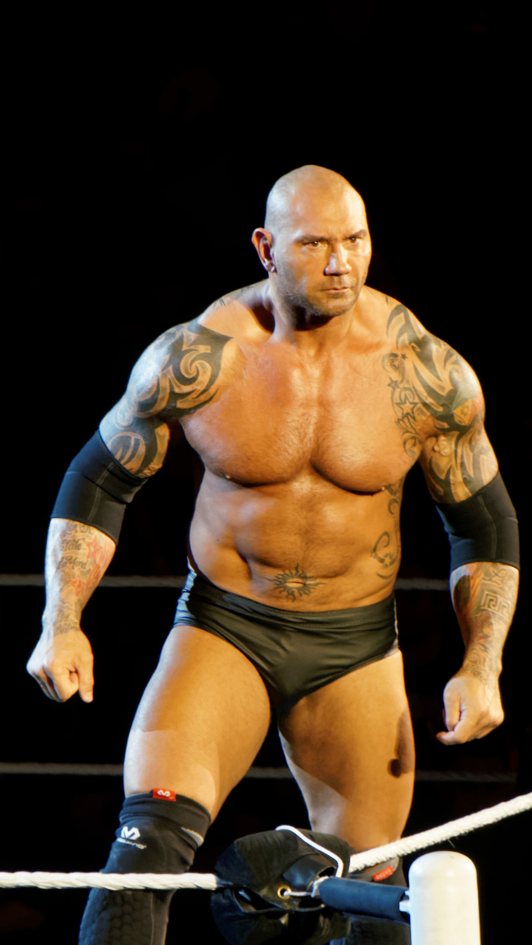 2014-04-07_20-17-40_NEX-6_1210_DxO